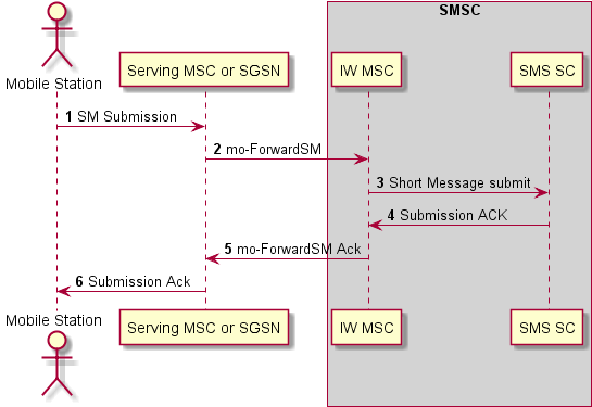 SM Submission Call Flow